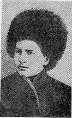 Михаил Васильевич Гузаков (1885-1908) - один из руководителей революционно движения в Симском горном округе. Организатор забастовки рабочих кирпичного и кузнечного цехов (1903). С 1904 года возглавил подпольную большевистскую группу, а в 1905 году создал боевую дружину рабочих Симского завода. Организатор митингов и забастовок рабочих в 1905 году, руководитель вооруженного восстания в Симе (1906)